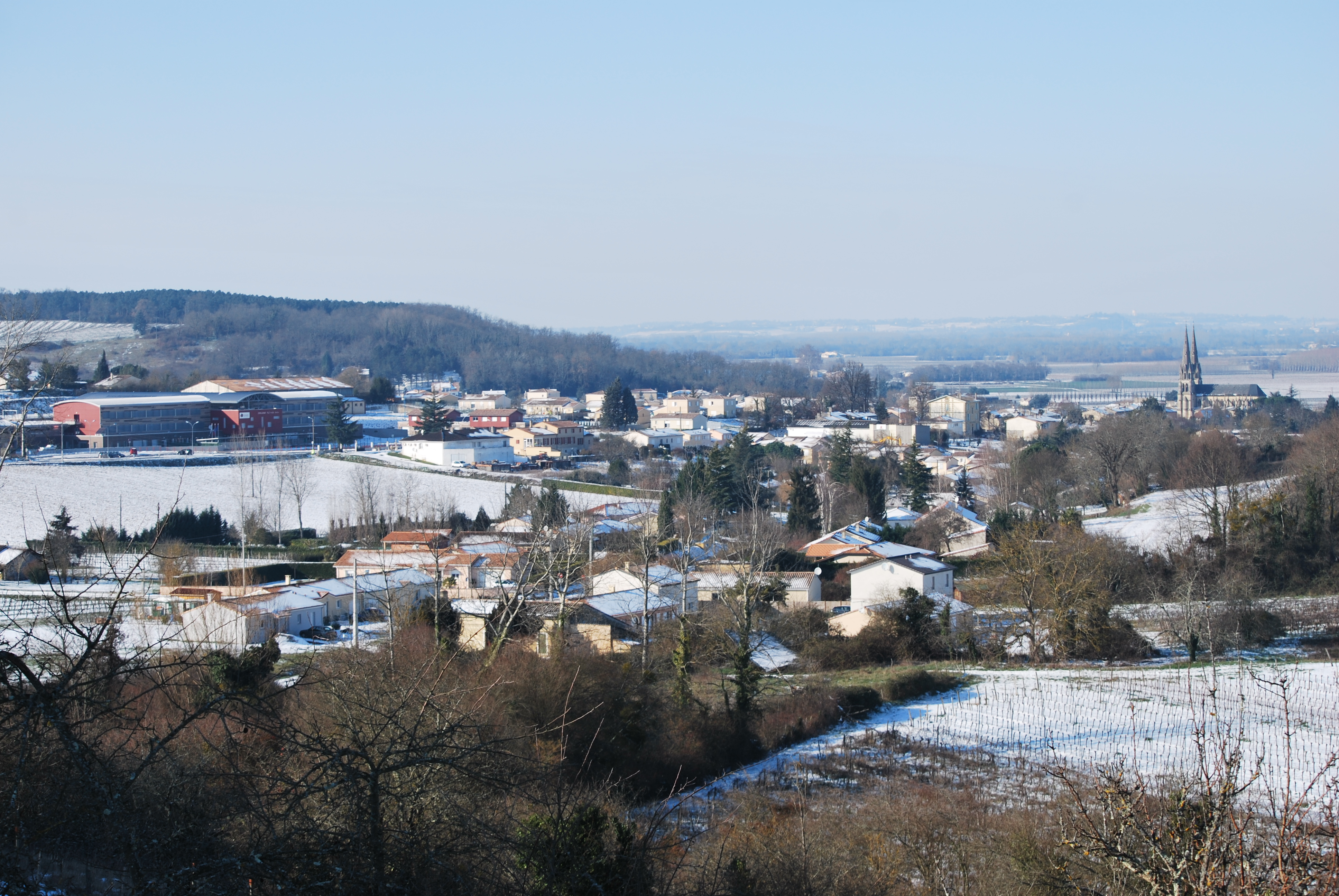 Panorama de la commune de Branne en Gironde sous la neige